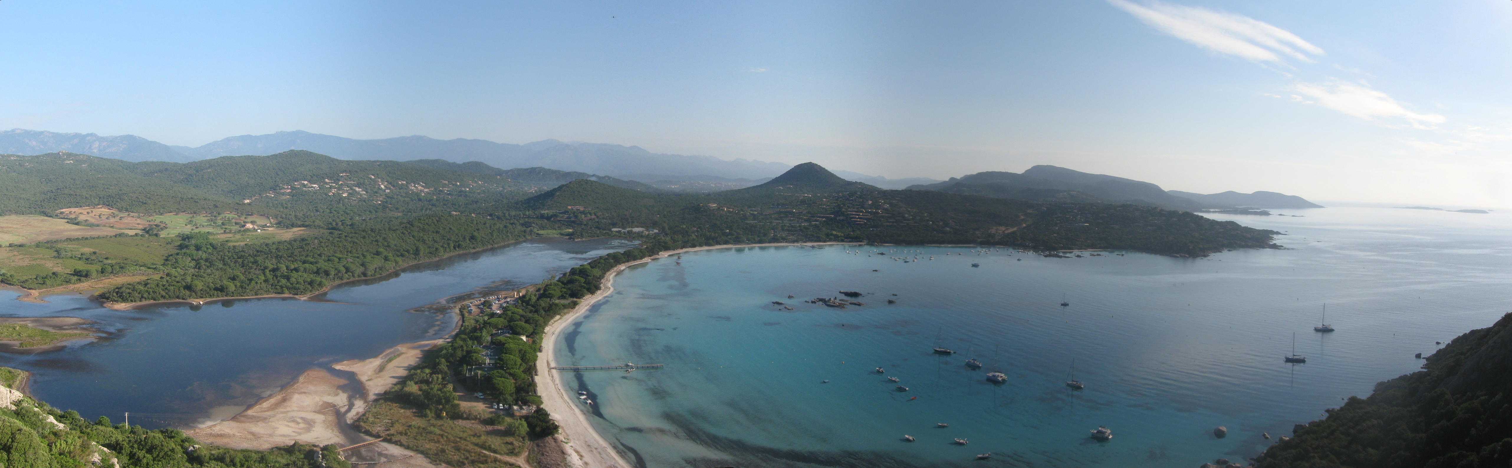 Etang et Golfe de Santa GiuliaCorsu: Stagnu é golfu di Santa Ghjulia